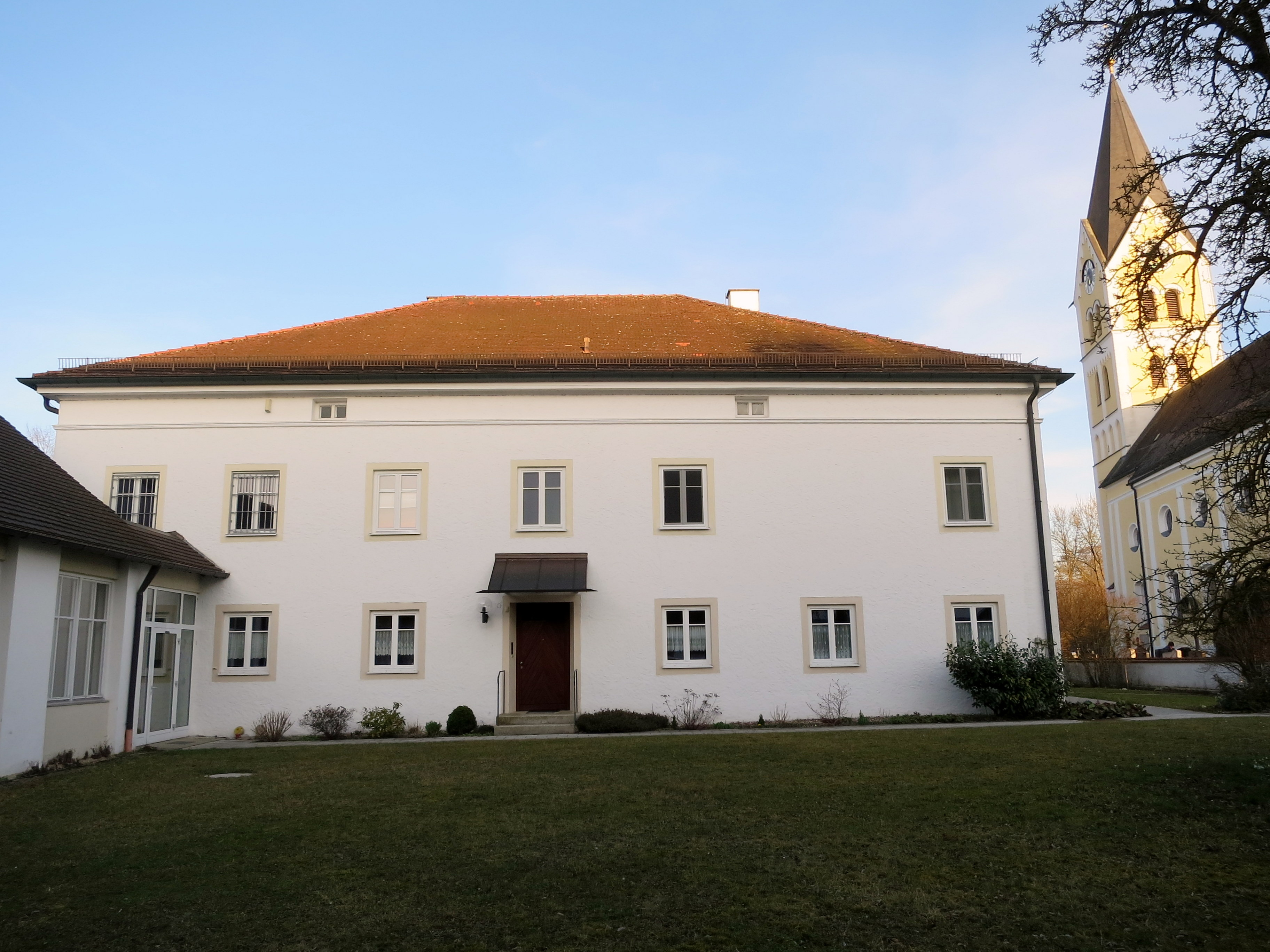 Das übrig gebliebene Pfarrhaus des ehemaligen Pfarrhofs